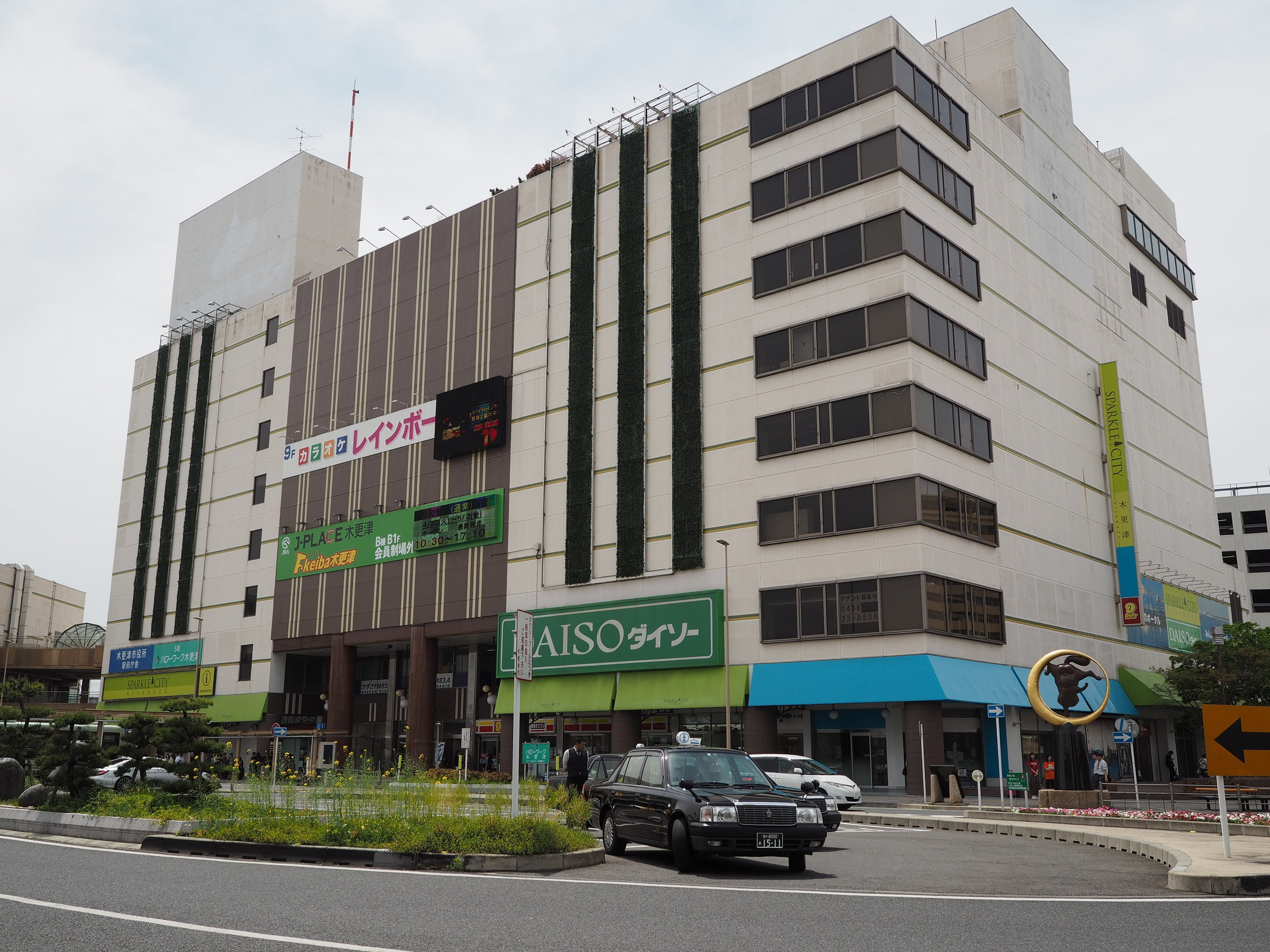 木更津駅西口にある商業施設、スパークルシティ木更津（旧アクア木更津）の外観